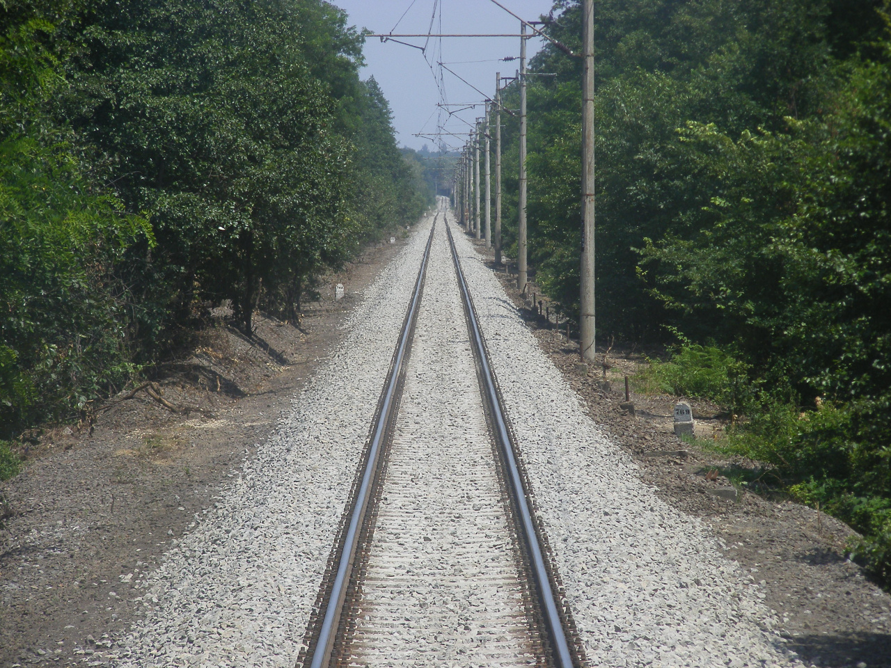 Bolhás-Szenta közötti felújított vágány (Somogy megye, Magyarország)